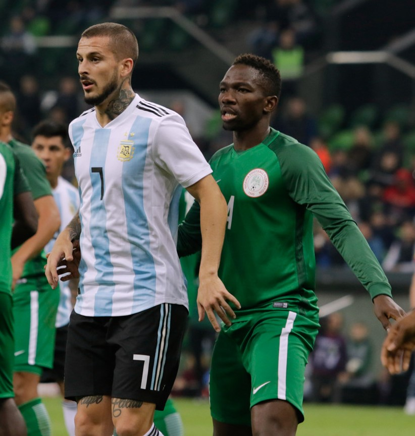 Darío Benedetto, Kenneth Omeruo